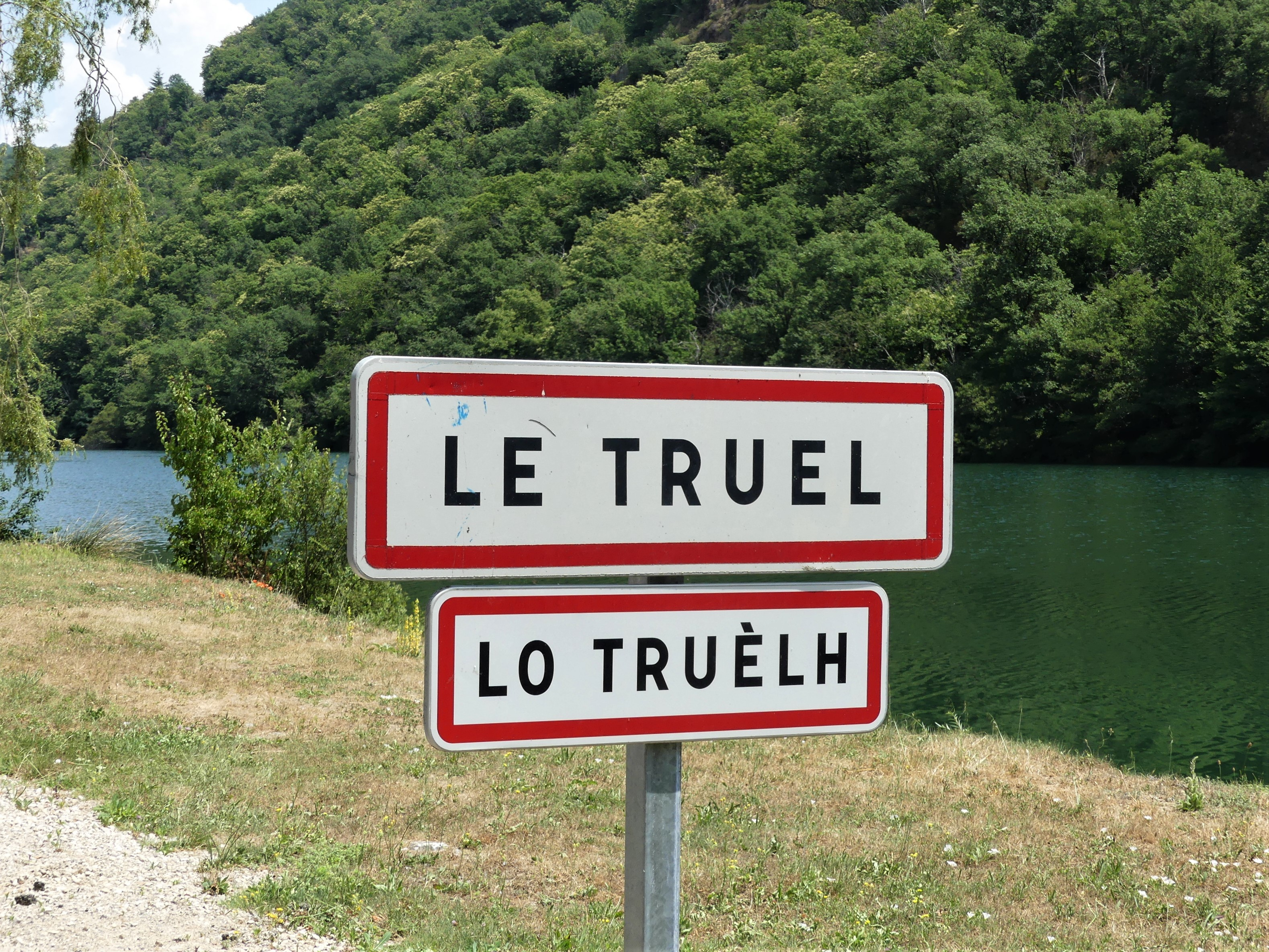 Panneau franco-occitan à l'entrée du bourg du Truel, Aveyron, France.